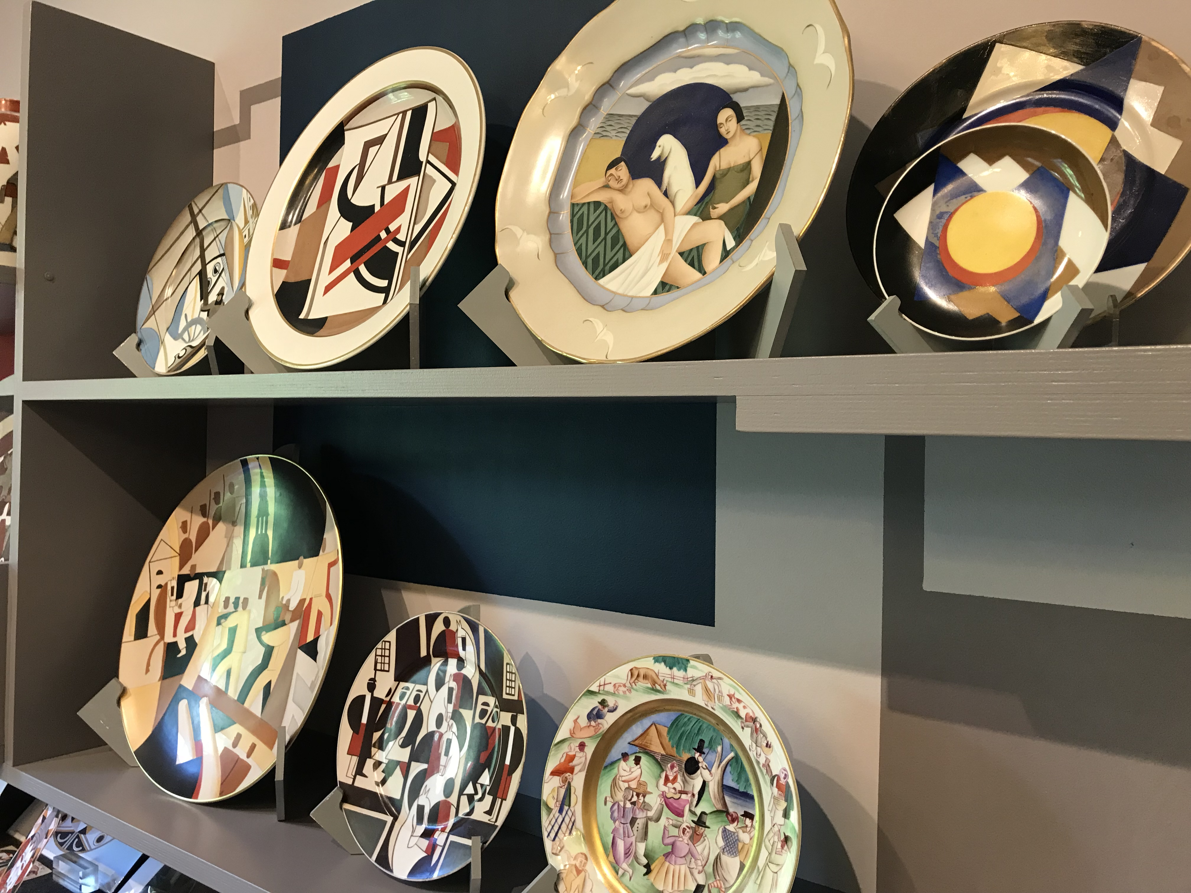 Romans Sutas och Aleksandra Beļcovas museum i Riga, porslin.